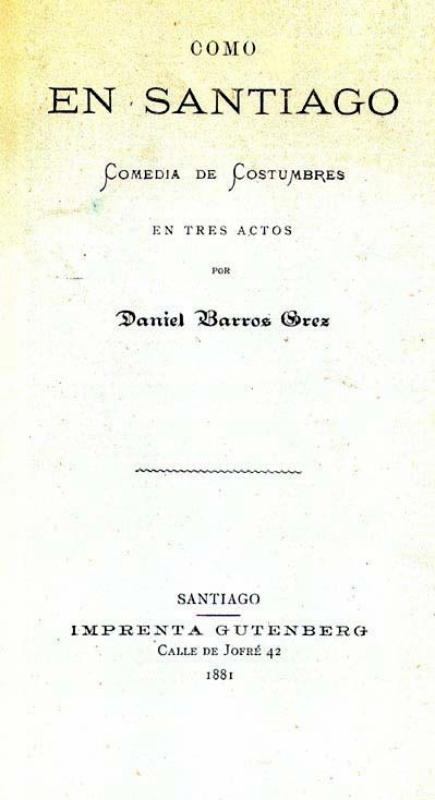 Como en Santiago, comedia costumbrista en tres actos.